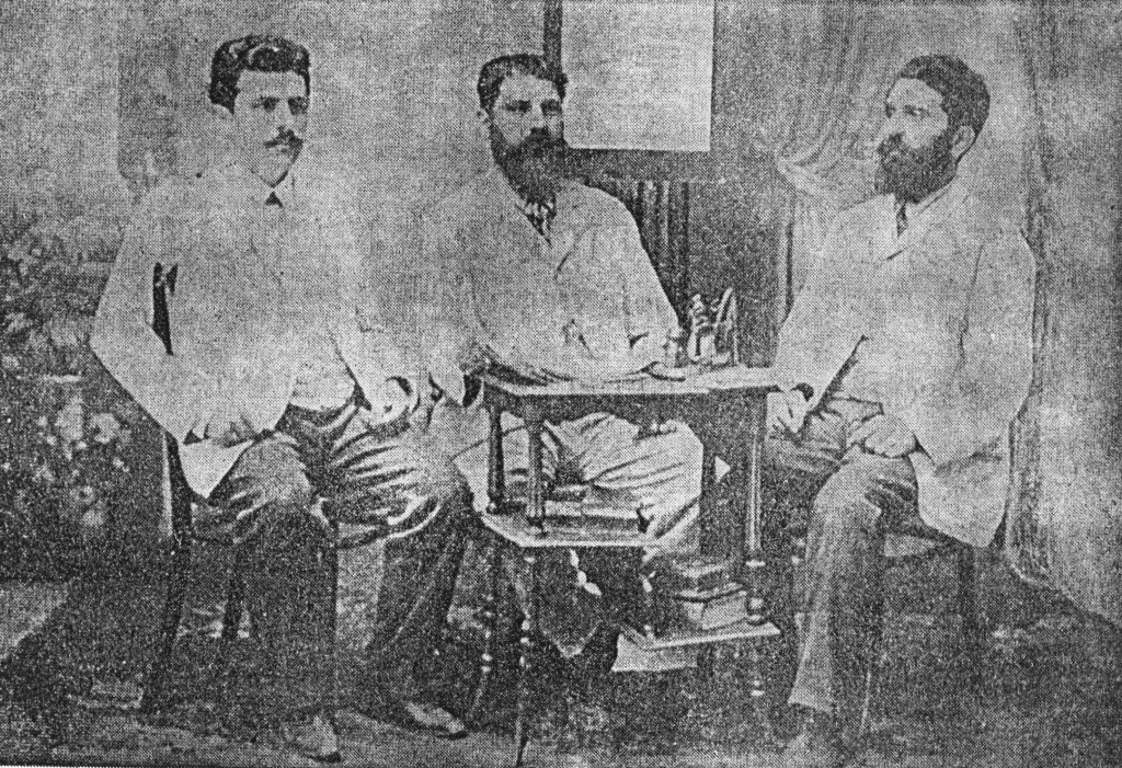 Ion Botez, Constantin Stere şi Garabet Ibrăileanu